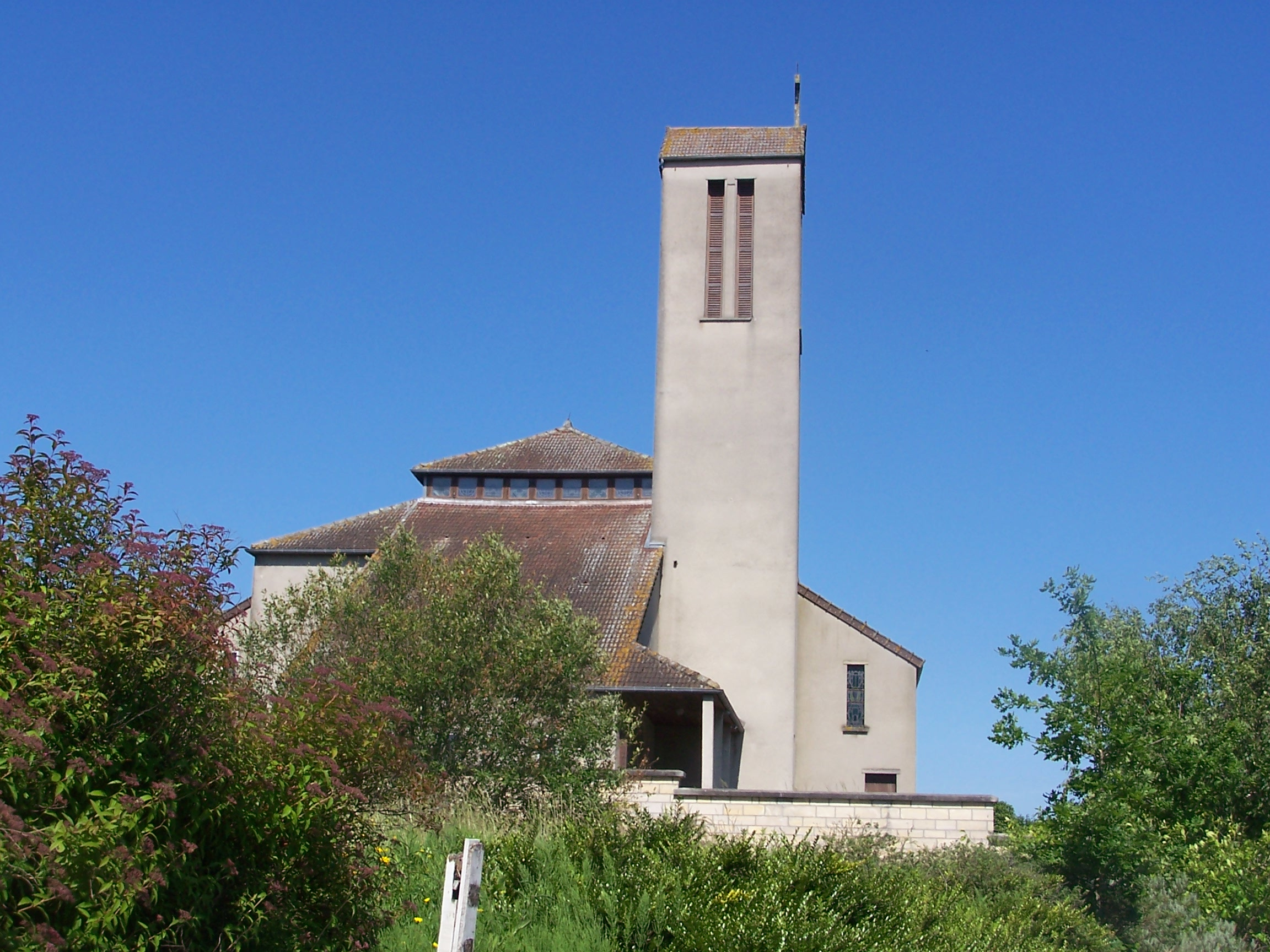 Chapelle Notre-Dame-de-la-Route à Sainte-Marguerite-d'Elle (Calvados)